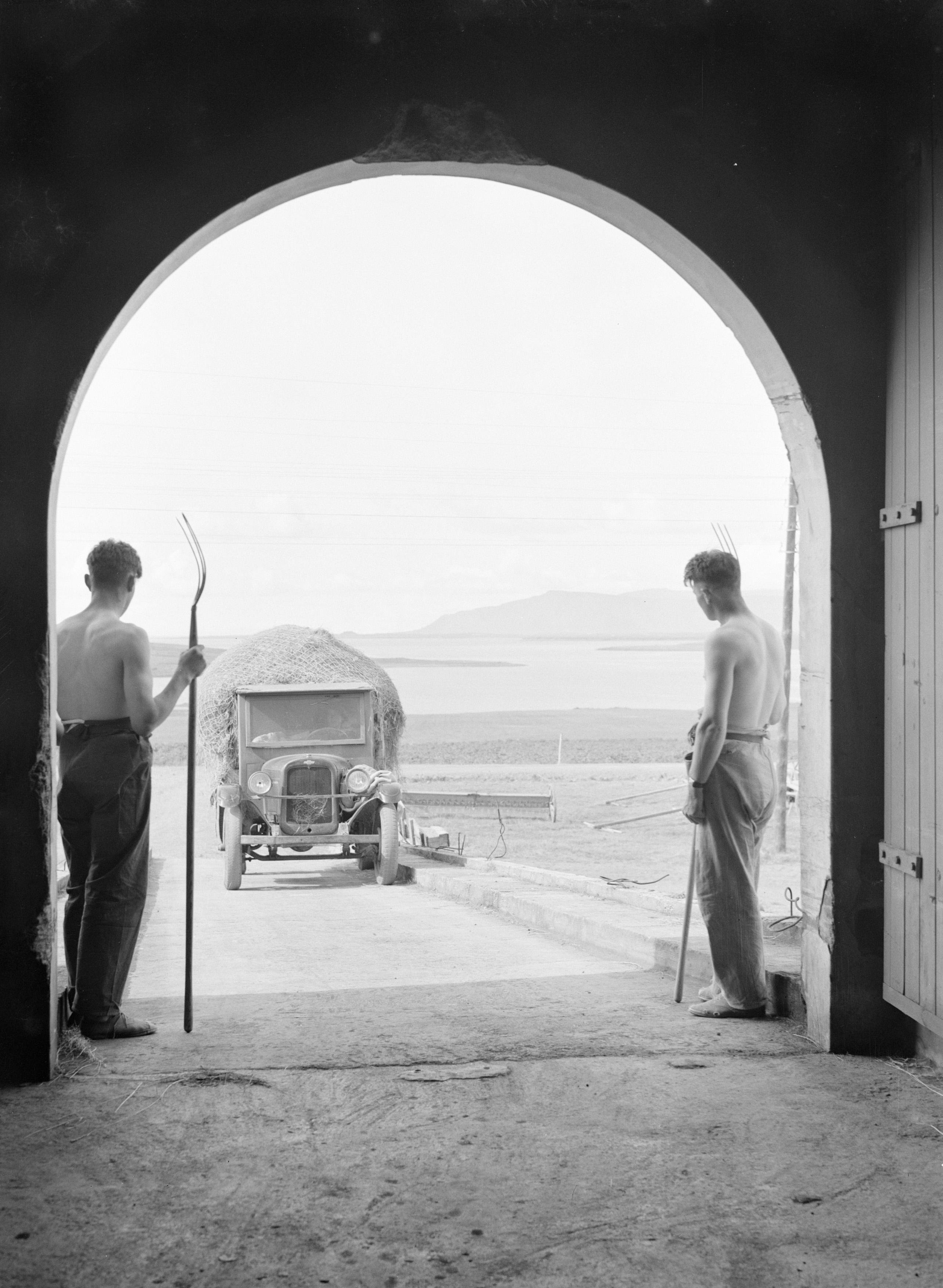 Collectie / Archief : Fotocollectie Van de Poll Reportage / Serie : IJsland Beschrijving : Boerderij in Korpúlfsstaðir. Een vrachtwagen met hooi rijdt via een helling de hooischuur binnen. Twee mannen met elk een hooivork staan te wachten bij de ingang Datum : 1934 Locatie : IJsland, Korpúlfsstaðir Trefwoorden : arbeiders, hooi, hooien, poorten, vrachtwagens Fotograaf : Poll, Willem van de Auteursrechthebbende : Nationaal Archief Materiaalsoort : Glasnegatief Nummer archiefinventaris : bekijk toegang 2.24.14.02 Bestanddeelnummer : 190-0382